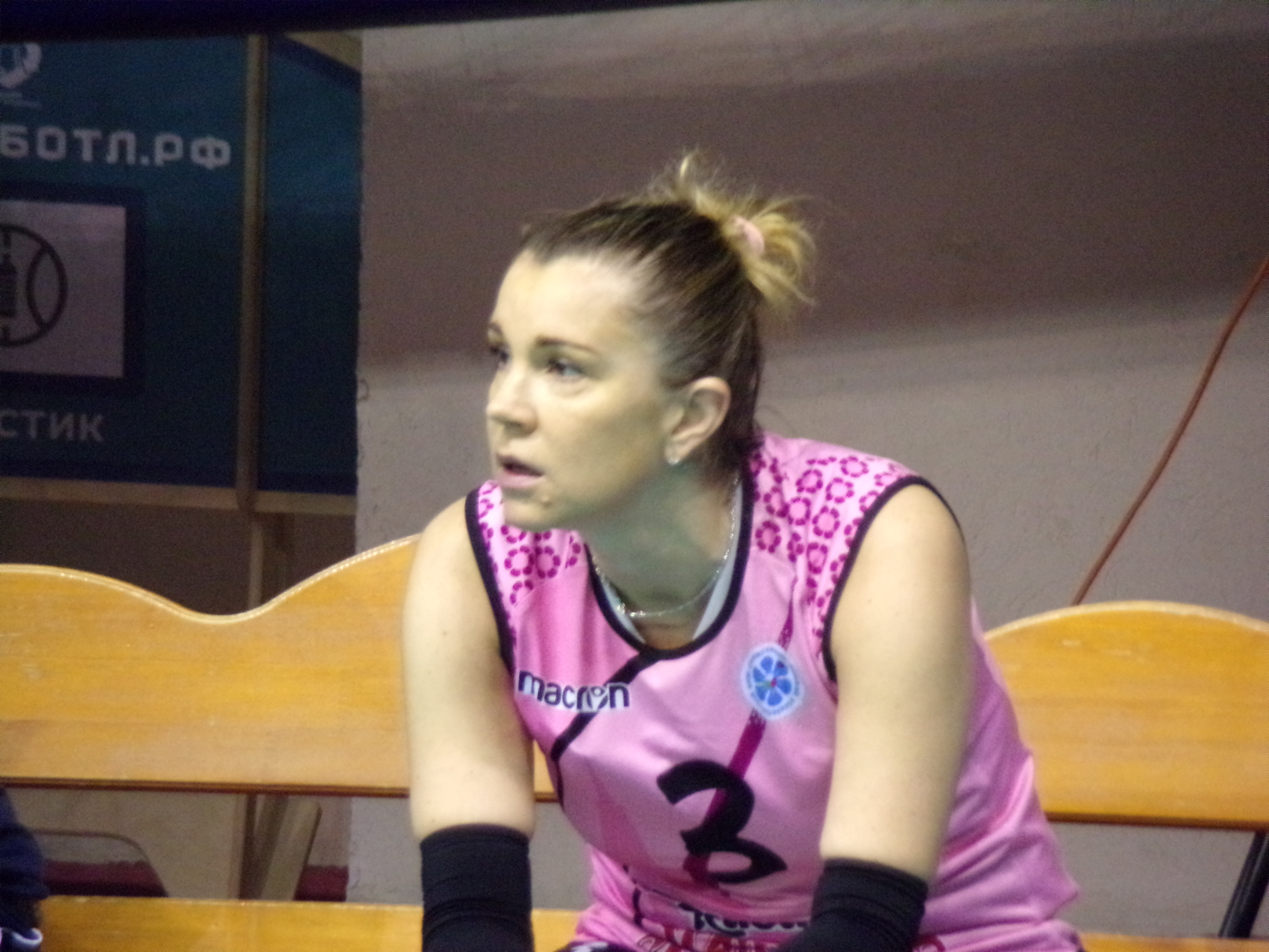 Елена Ежова в составе команды "Динамо-Казань", 09.02.2018